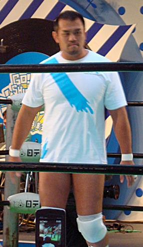 Jun Akiyama, August 2008.